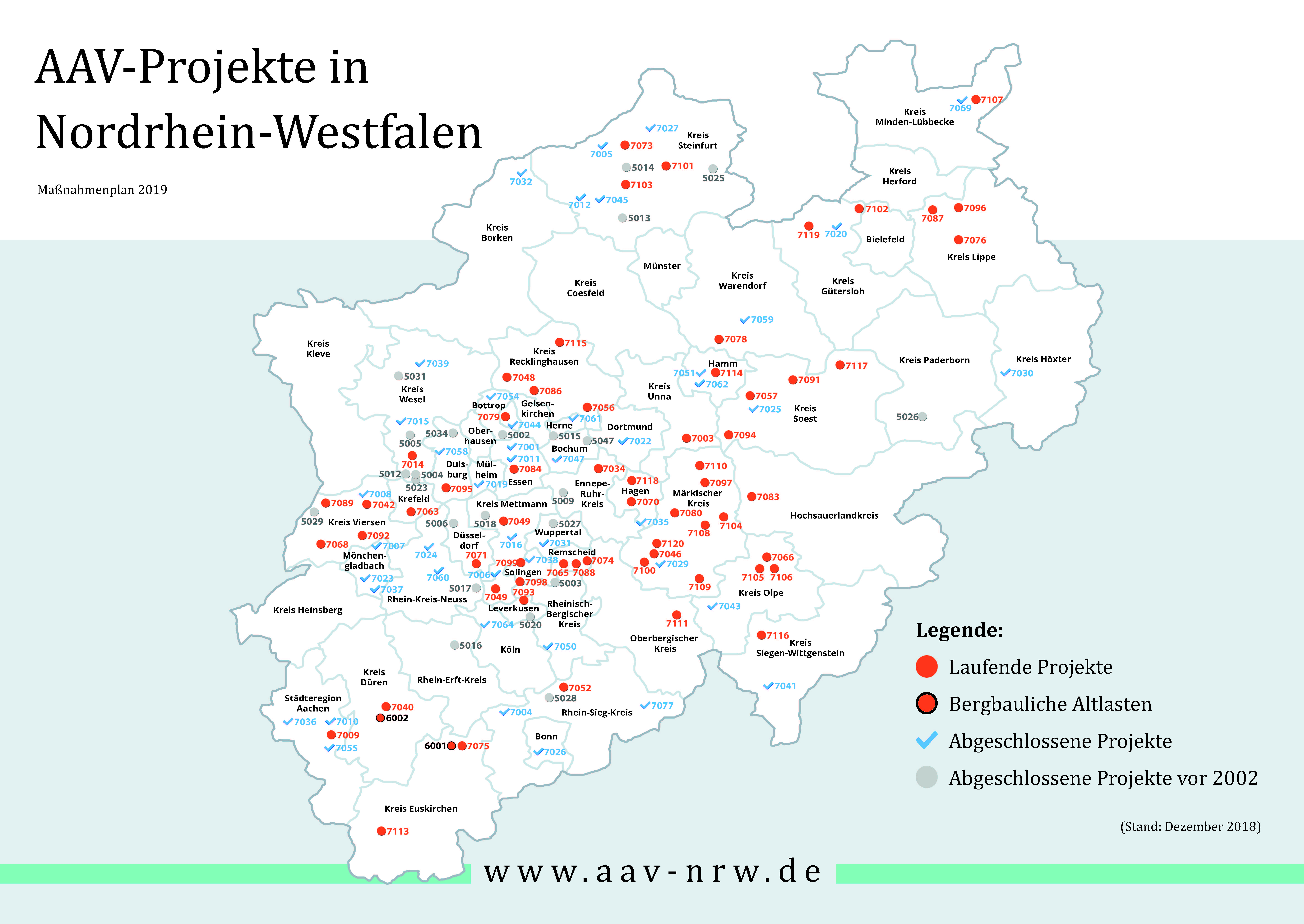 Die Karte zeigt, wo der AAV bereits Altlasten saniert hat und wo er künftig tätig wird.